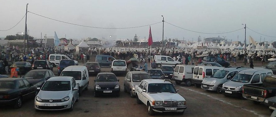 Fantasia, Chaouia-Ouardigha, Morocco